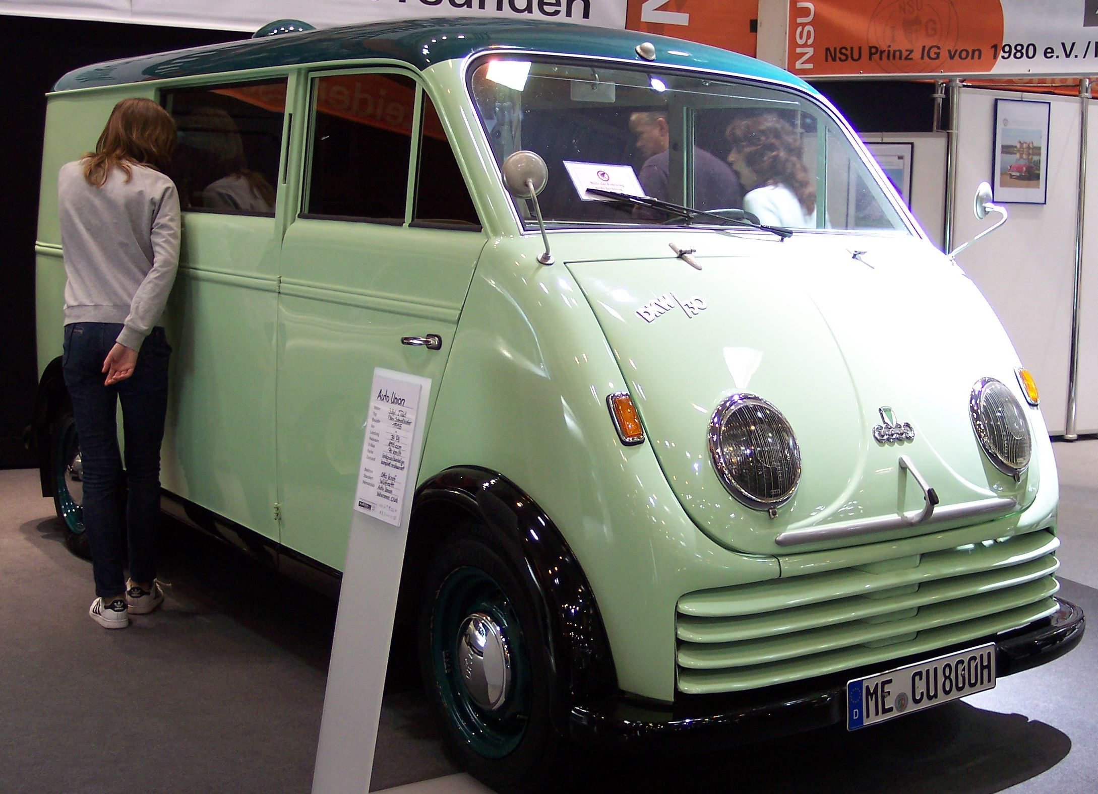 DKW F 800 1956